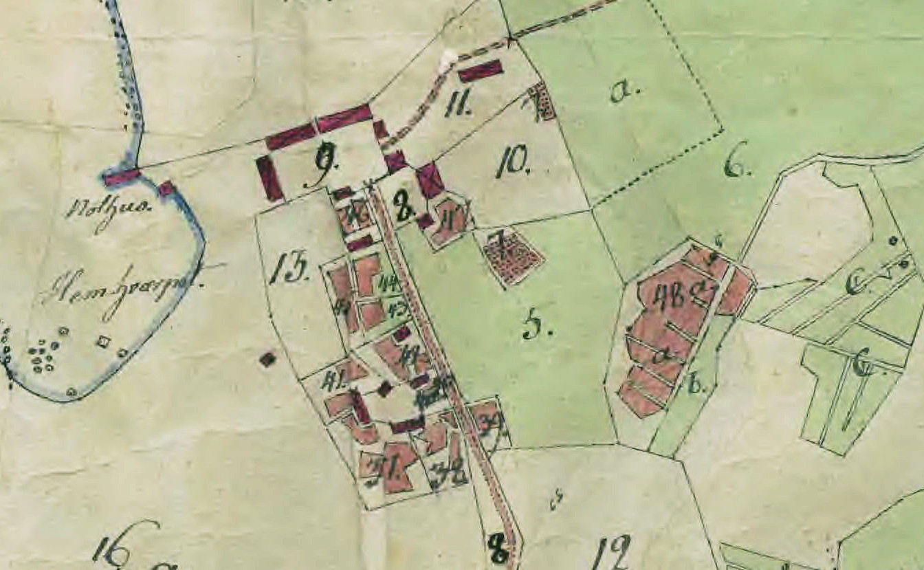 Sågarbos huvudbebyggelse. 8: Gårdstomt 9: Stall- och ladugårdstomt